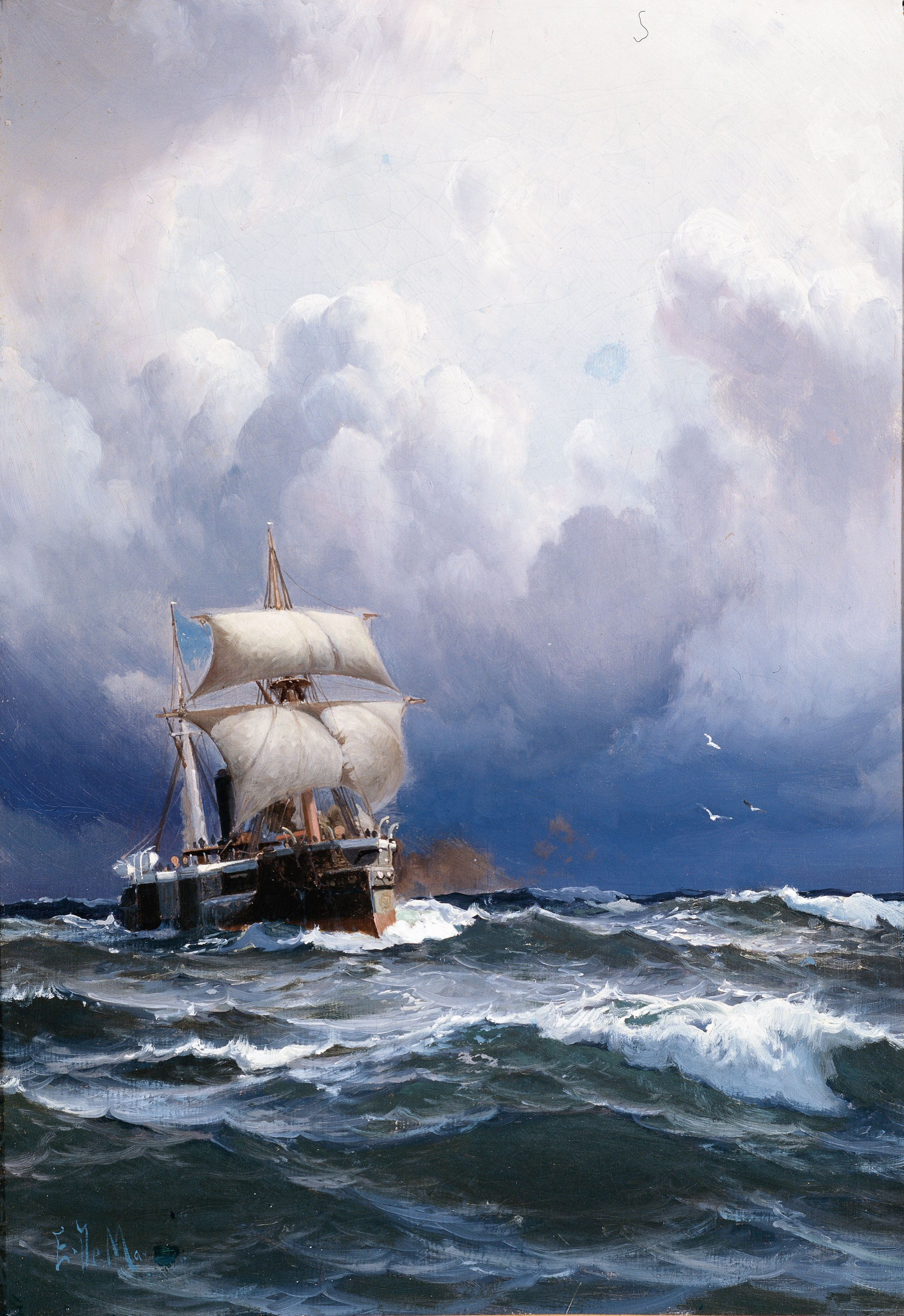 Eduardo de Martino, El Almirante Brown llegando a puerto. Siglo XIX. 46 x 31,4 cm, marco: 74,5 x 59,1 x 4,2 cm, óleo sobre tela. Inv. 1672.